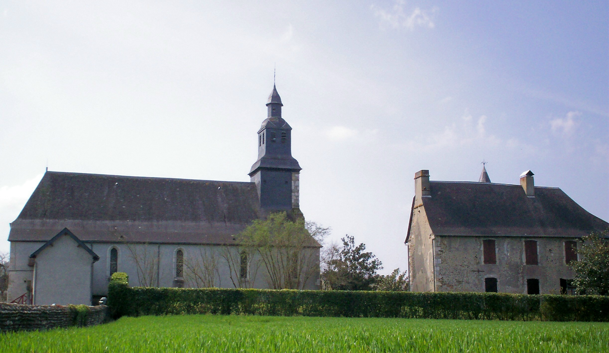 Glèisa d'Abòs